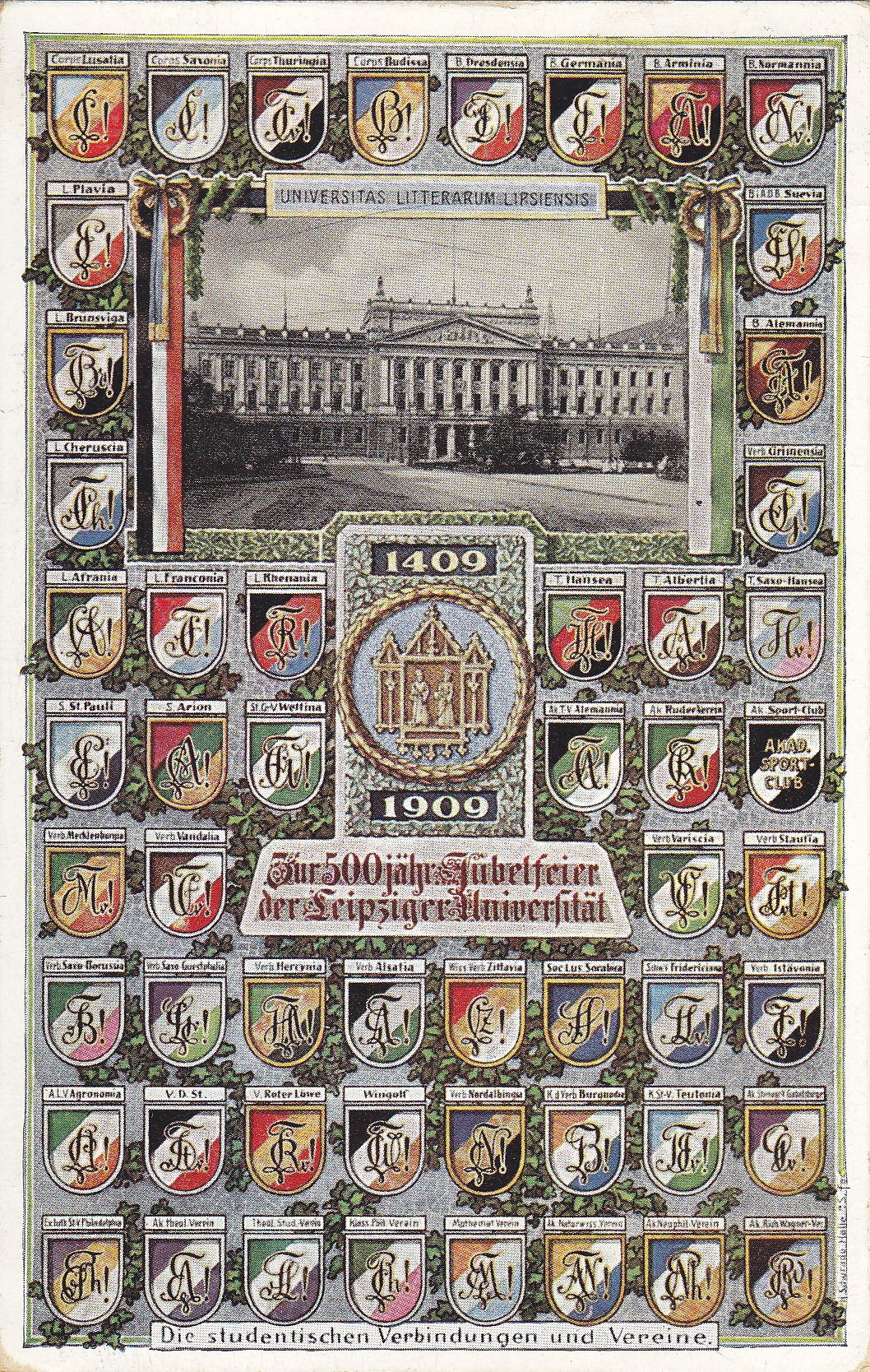 Ansichtskarte mit Farben, Zirkeln und Namen aller Studentenverbindungen an der Universität Leipzig im Jahr des 500. Jubiläums 1909